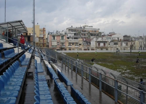 Prosfigika Groud in Patras Γήπεδο Προσφυγικών Πάτρας